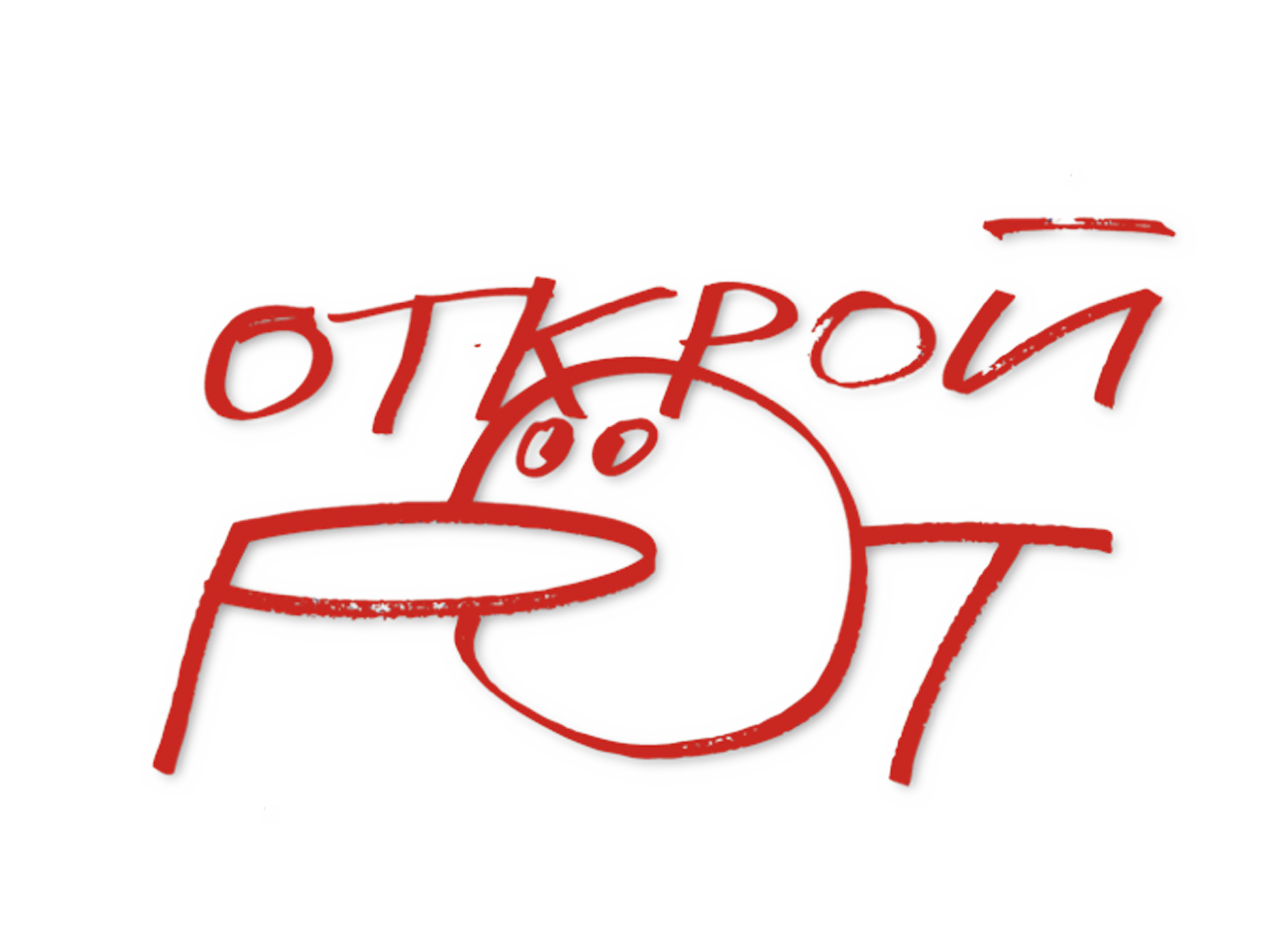 Логотип чемпионата по чтению вслух "Открой Рот" работы художника Вячеслава Мизина